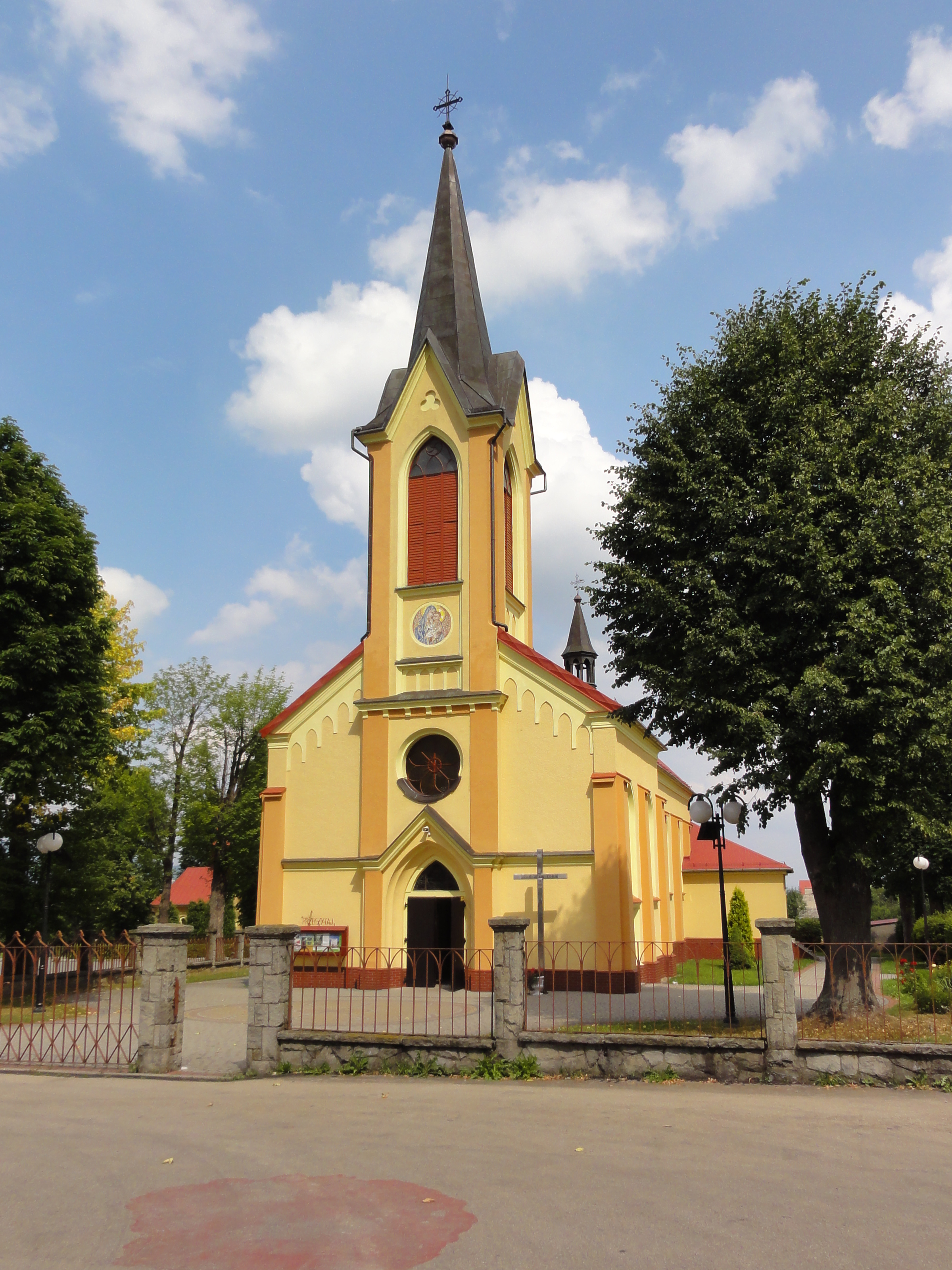 Kościół Matki Bożej Szkaplerznej w Godziszce